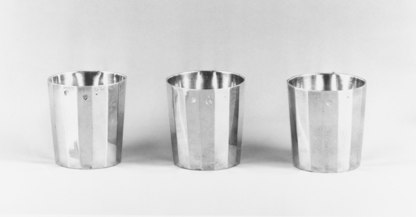 French, Paris; Liqueur cups; Metalwork-Silver